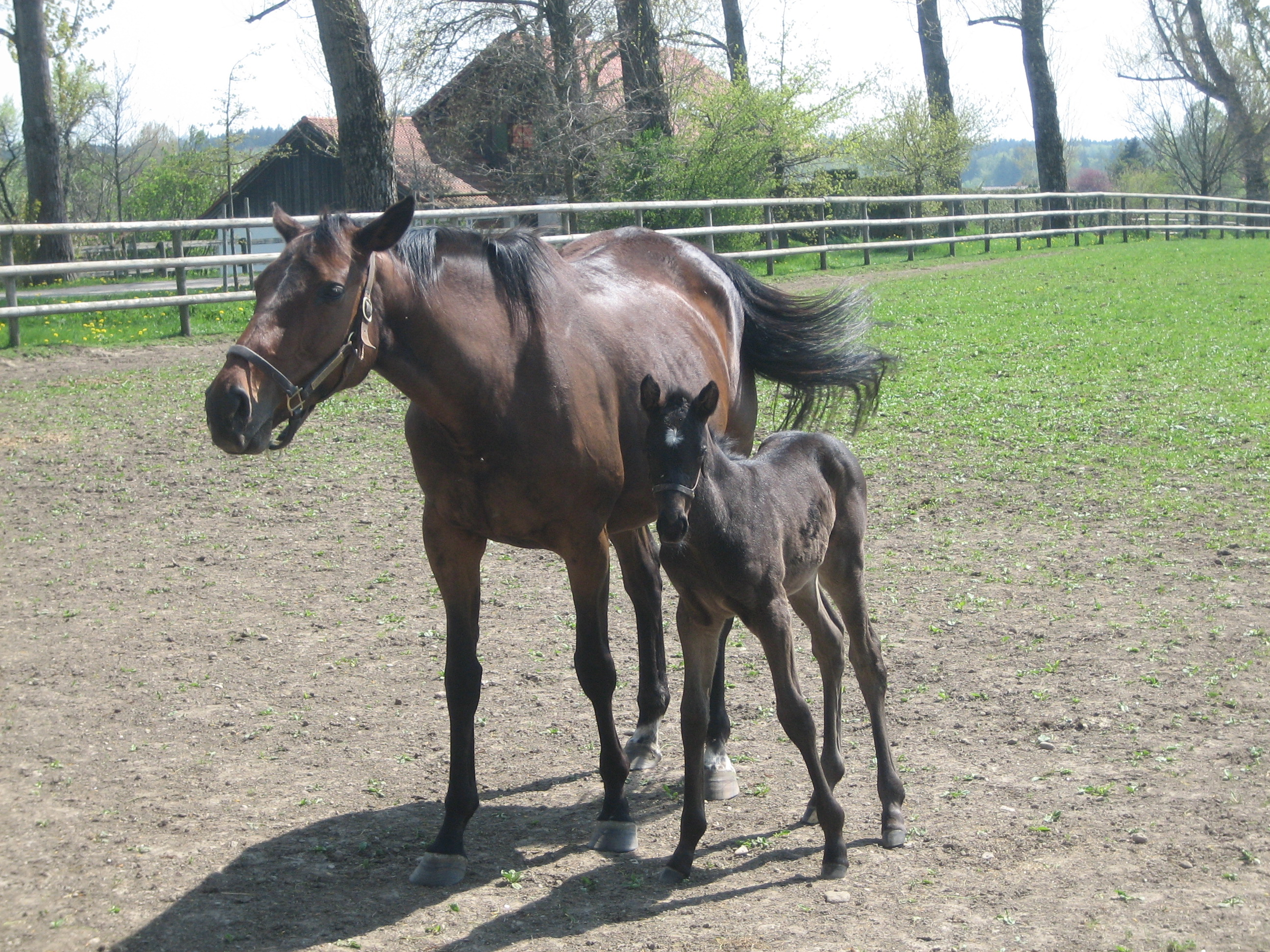 Rennpferd Borgia mit ihrem Fohlen im Gestüt Ammerland.